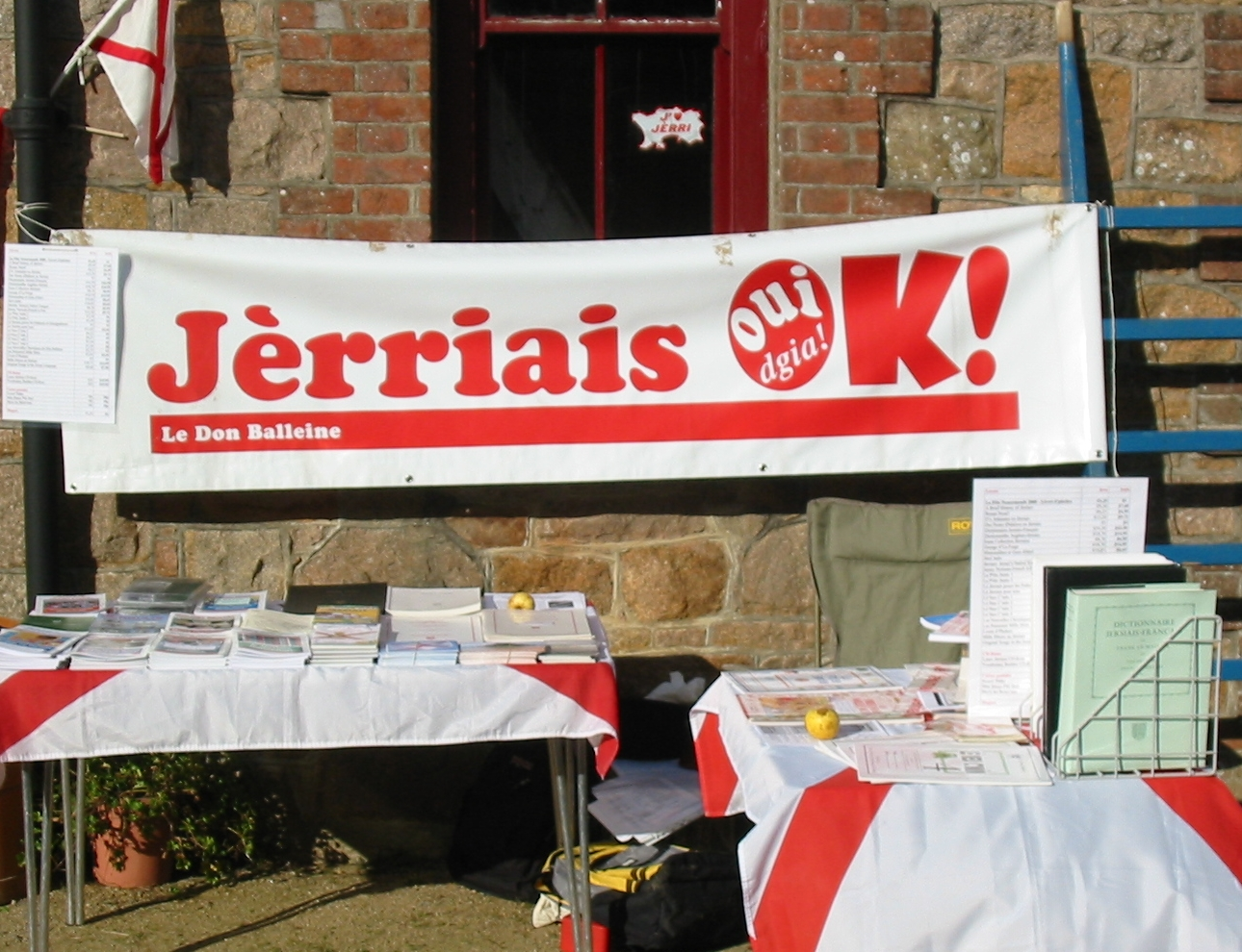 Nrf: Faîs'sie d'Cidre, 18 d'Octobre 2008, Jèrri